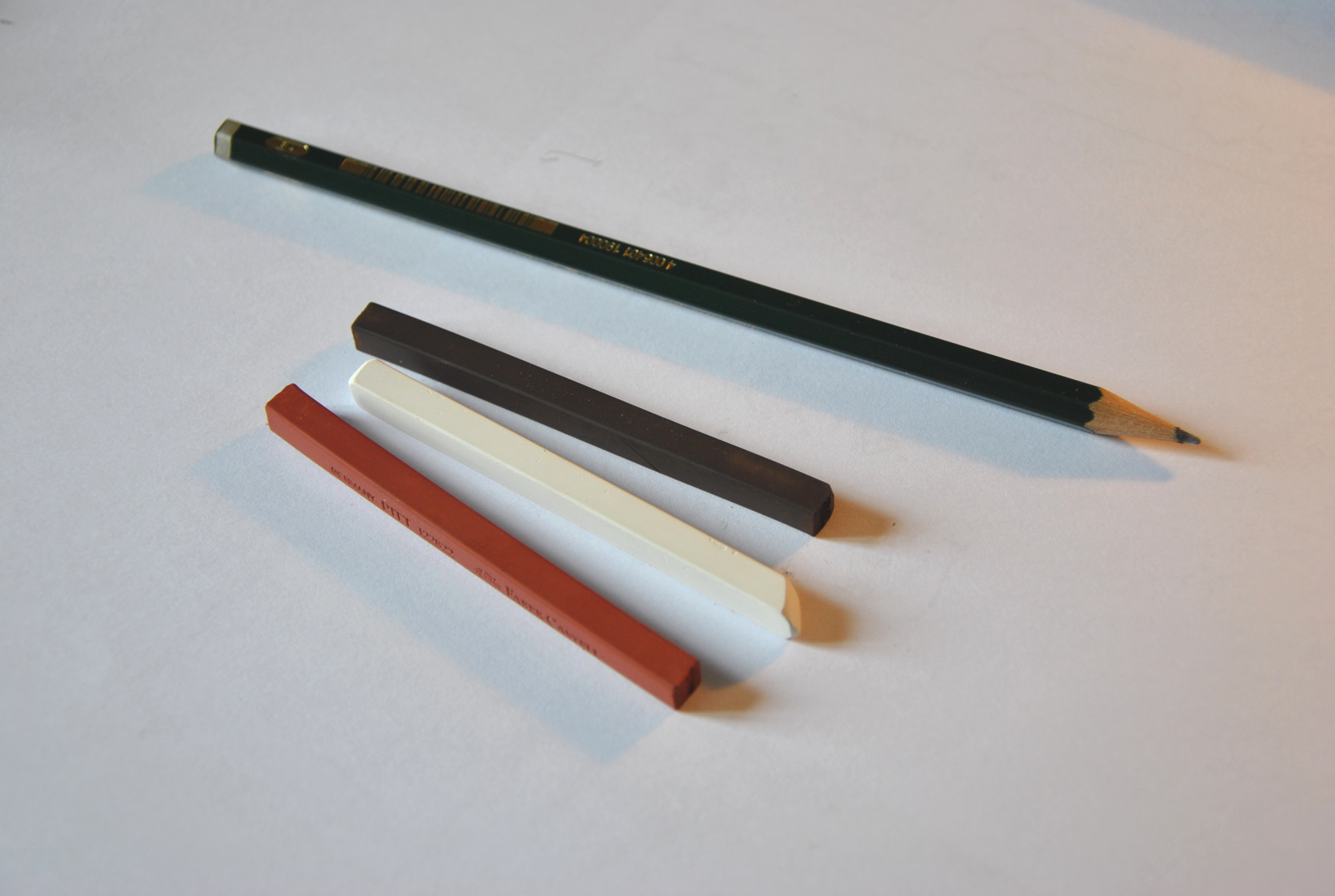 Matériel de dessinateur: trois craies neuves et un crayon HB.